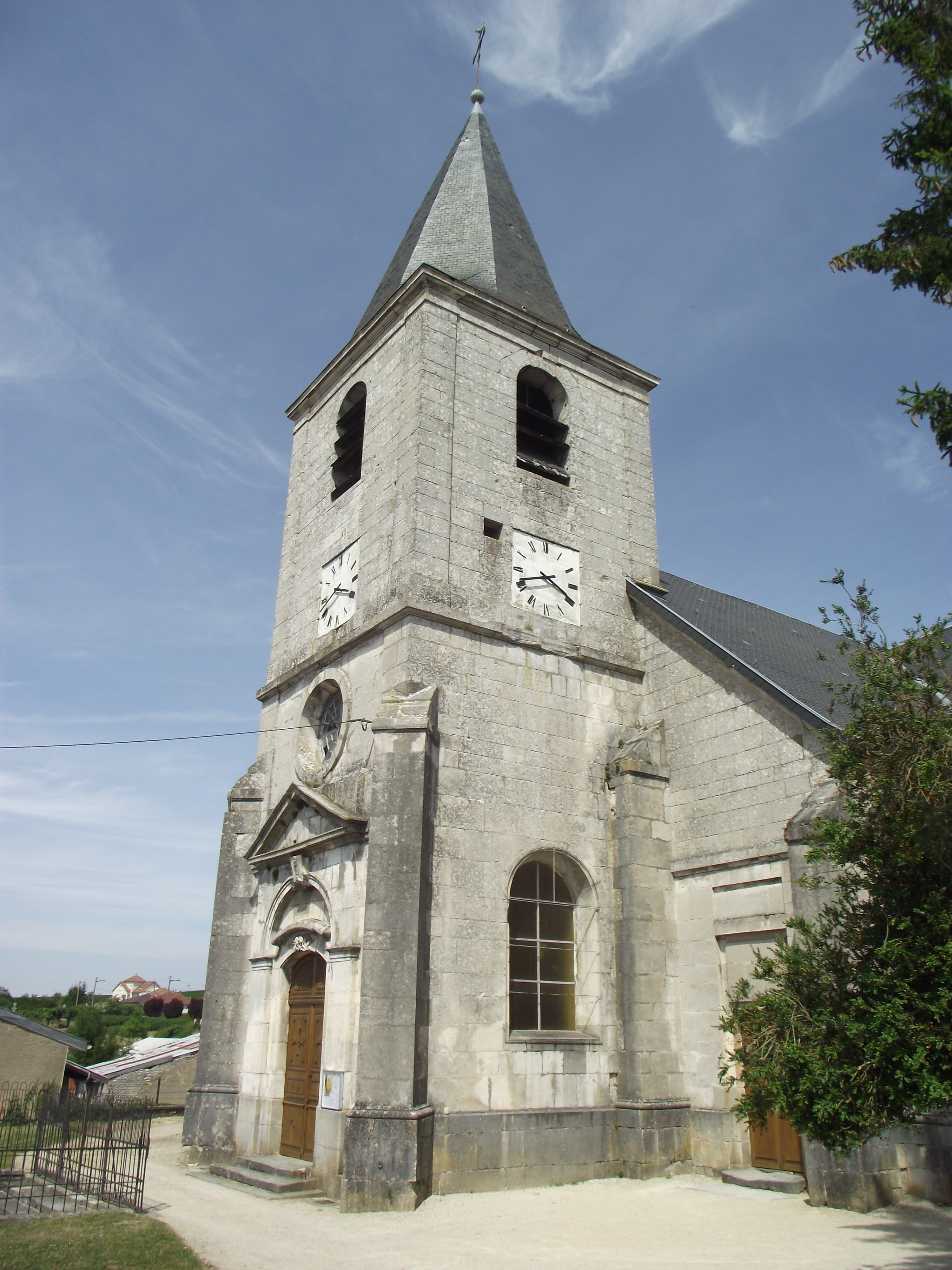 Eglise de Chalaines (55) vue du porche.